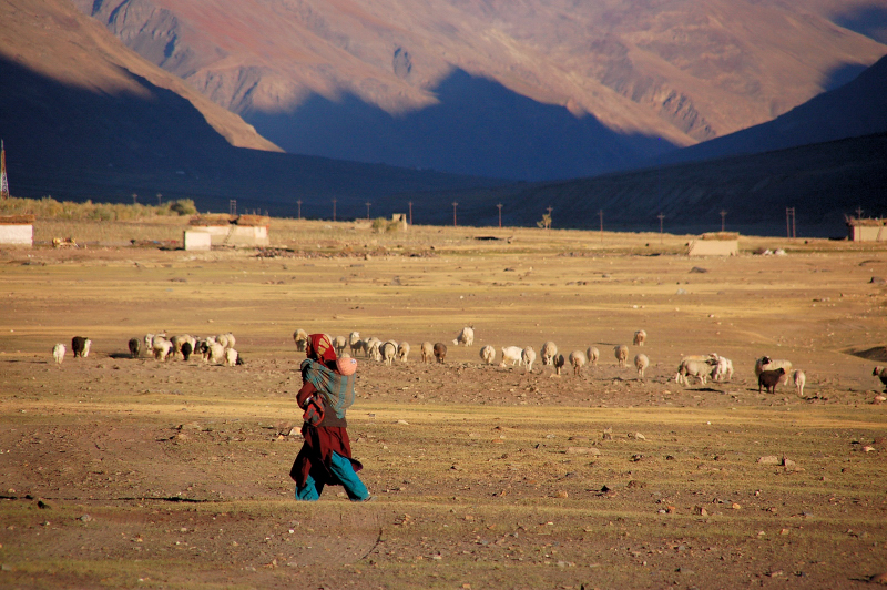 Zanskar Valley, Ladakh, India